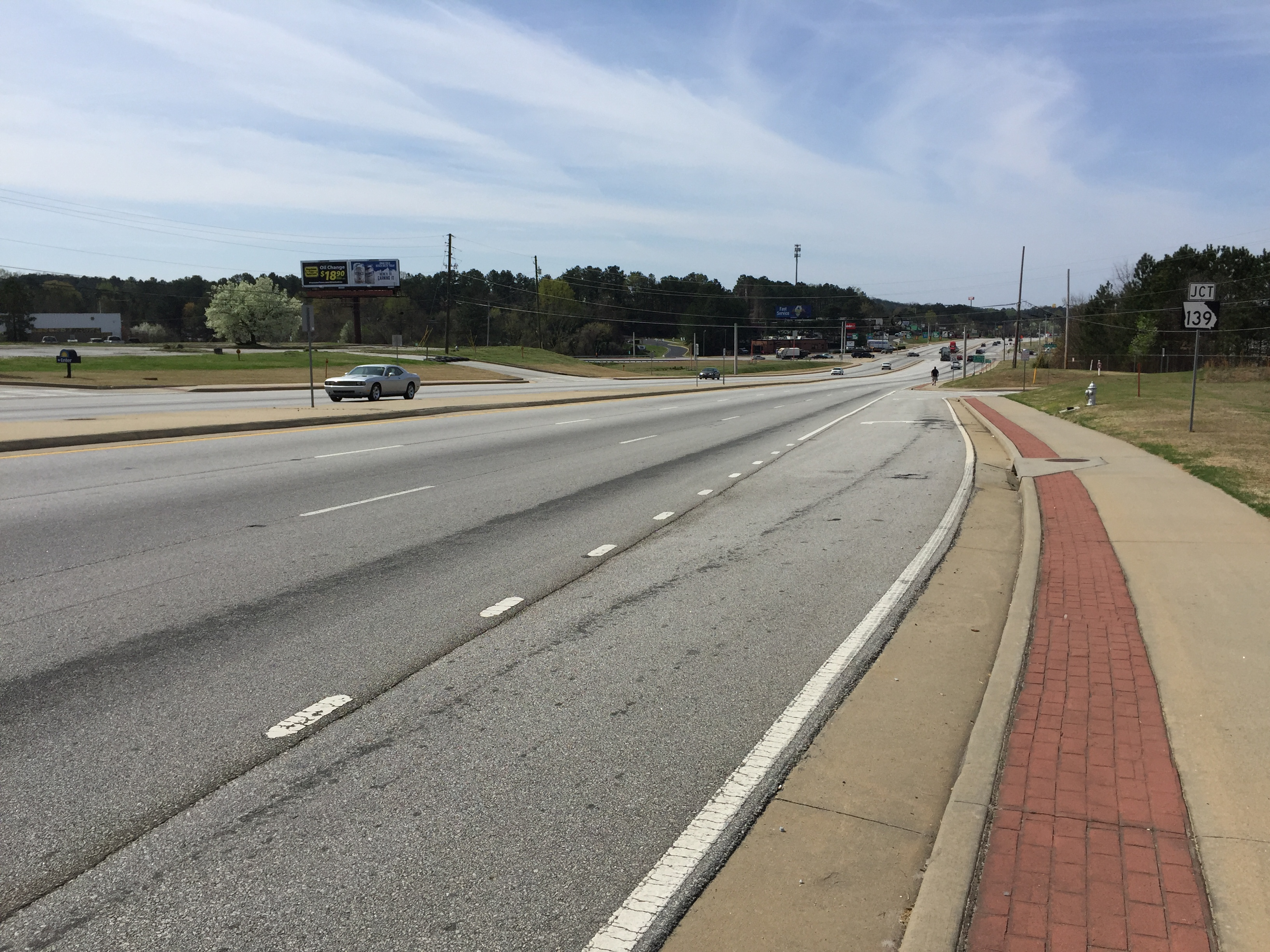 Fulton Industrial Boulevard